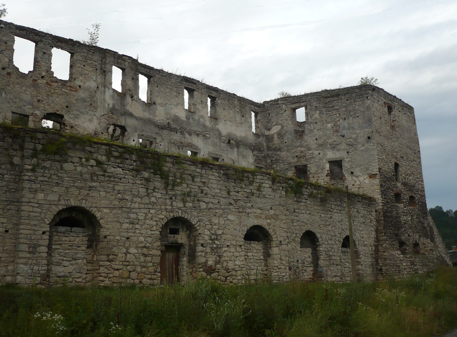 Zamek w Czortkowie